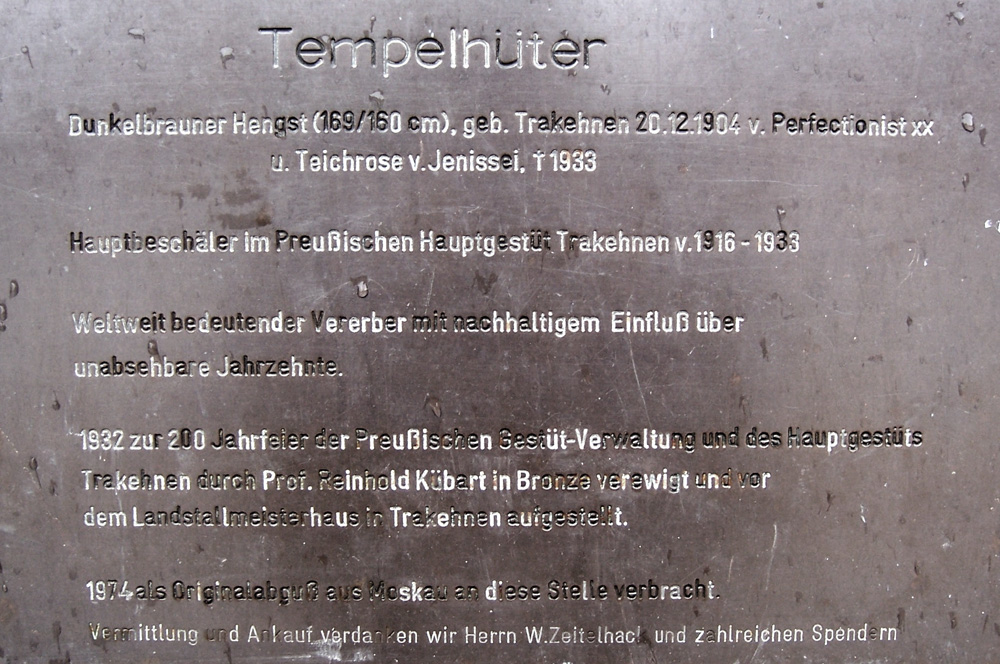 Infotafel zur Statue Hengst Tempelhüter (*20. Dezember 1904 in Trakehnen) am Holzmarkt in Verden.